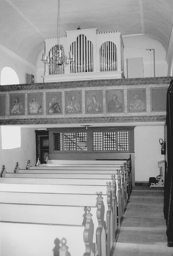 Innenraum der Reichenberger Kirche, Blick auf die Orgelempore